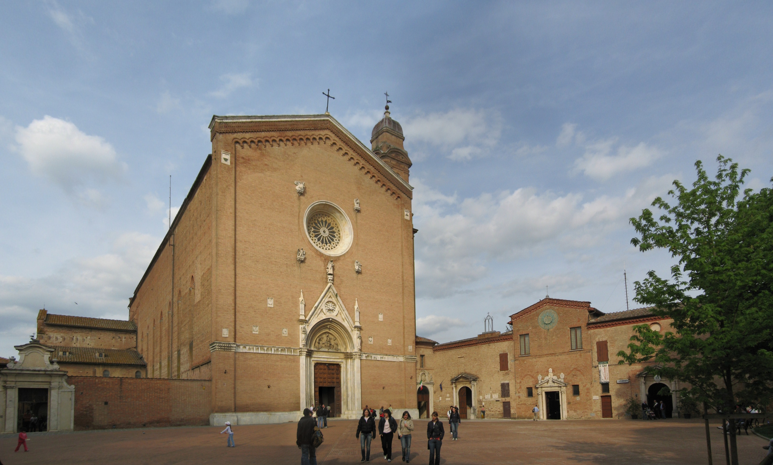 Basilica of San Francesco in Siena